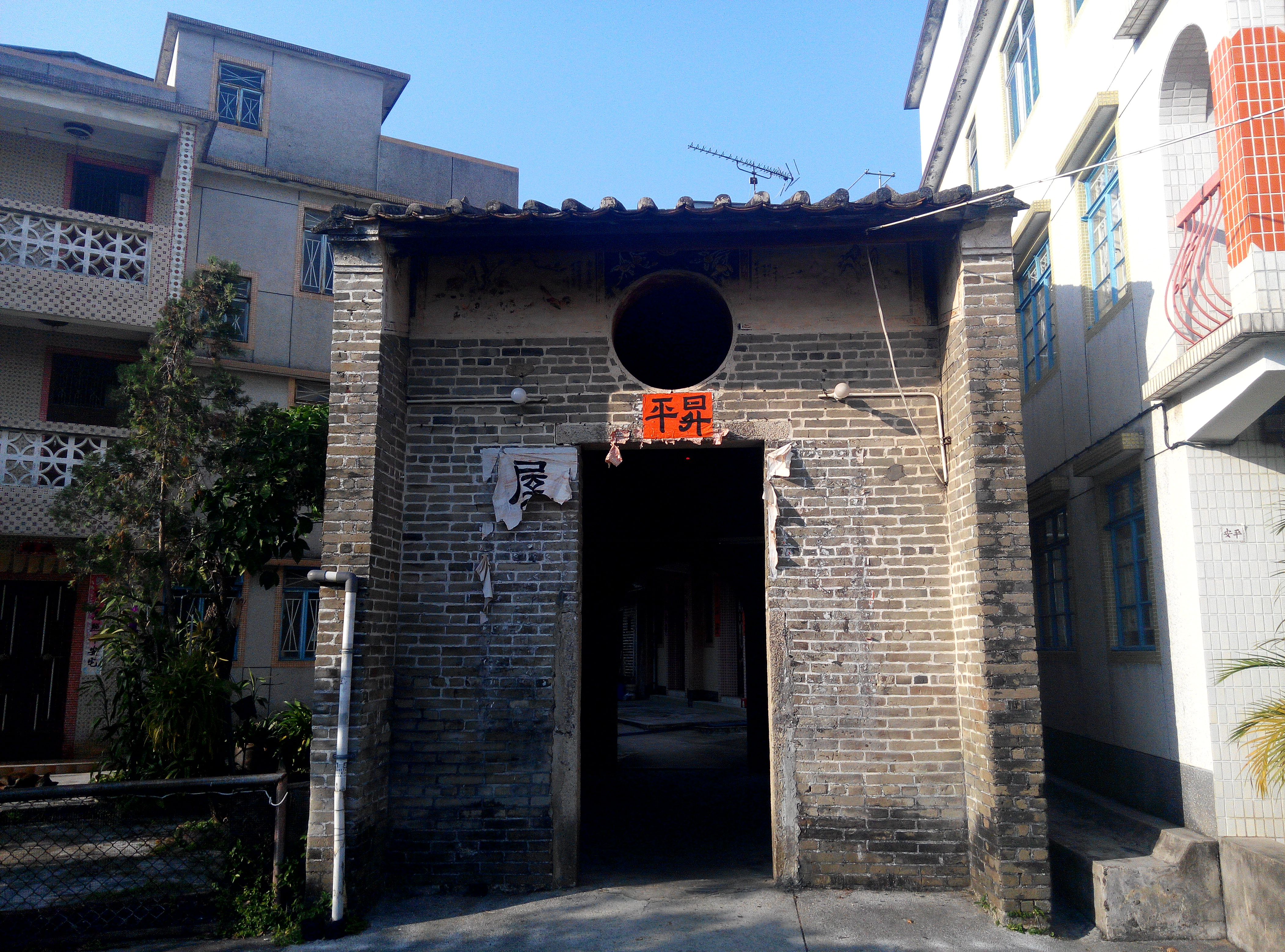 元朗屏山横洲吳屋村圍門